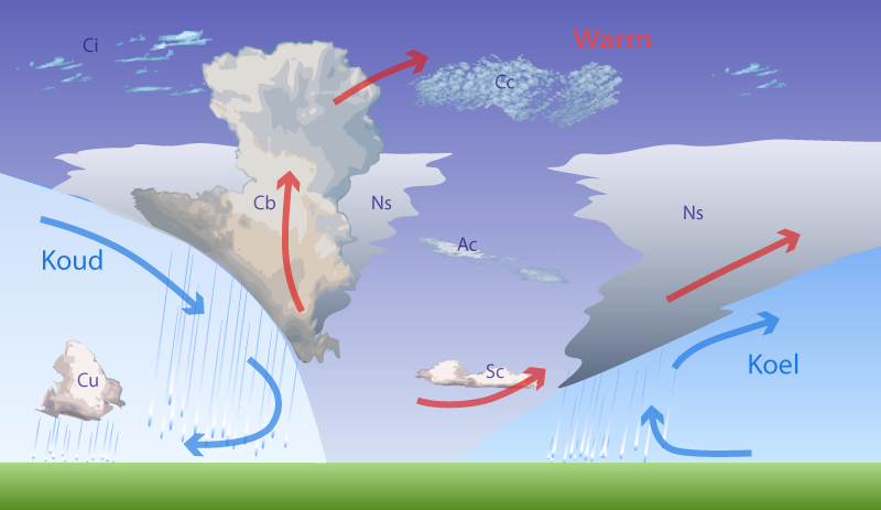 Een dwarsdoorsnede van de atmosfeer met een kou- en warmtefront.